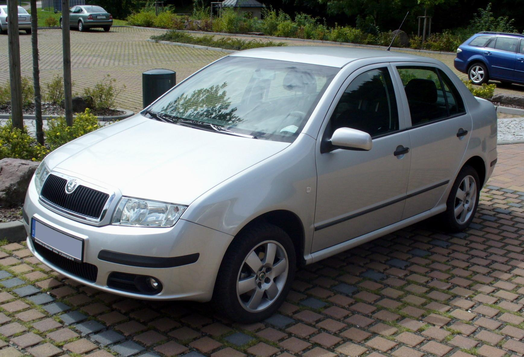 Skoda Fabia- KENNY T ON THE SKODA MIC